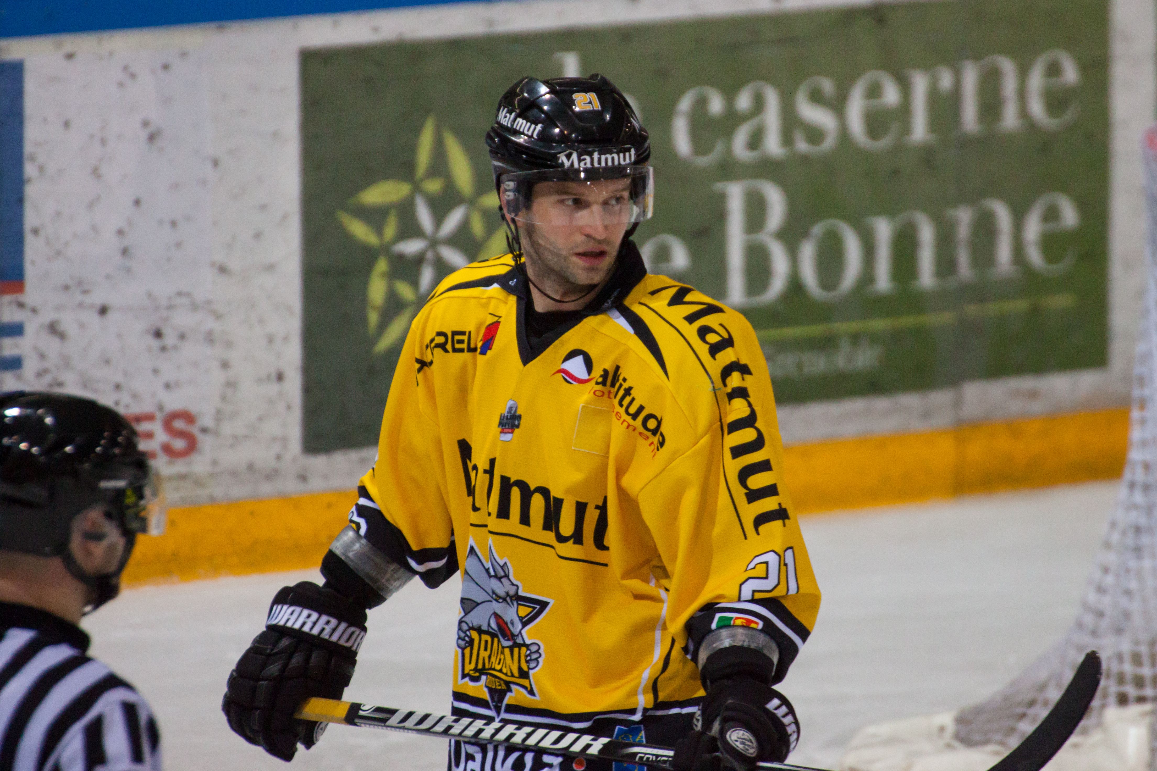 Janos Vas lors du match de Ligue Magnus Grenoble-Rouen le 1er février 2014.